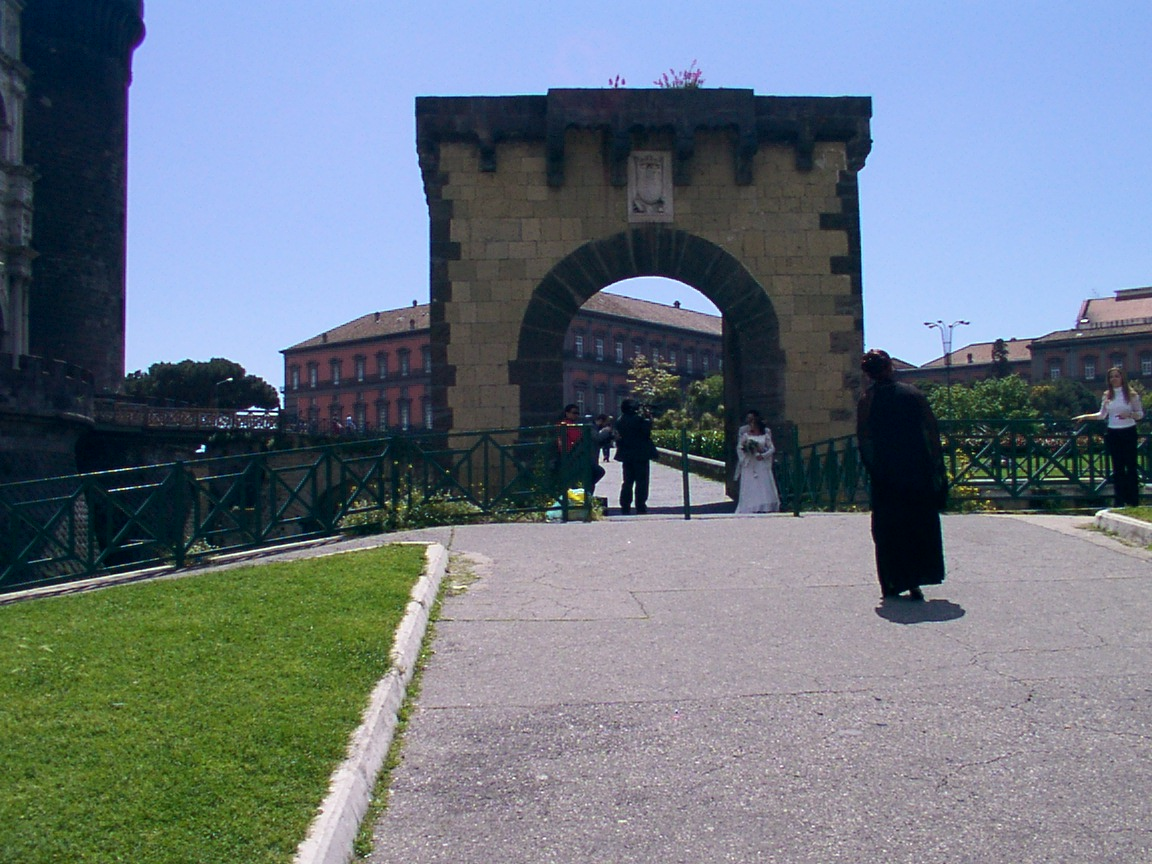 נופי נאפולי